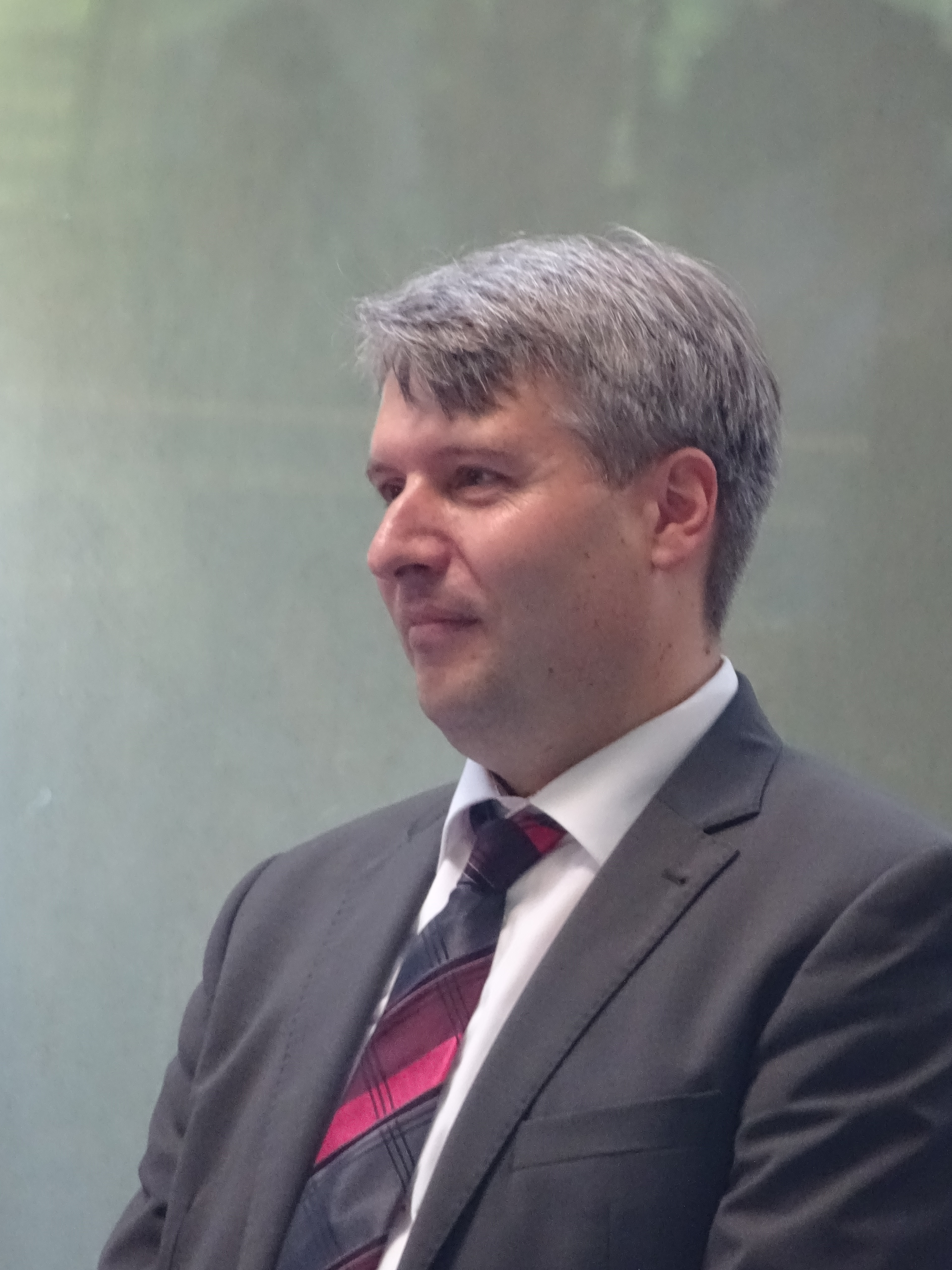 Stefan Ketter, kommissarischer Leiter des Gymnasium Philippinum während einer Rede anlässlich der Abiturientenverabschiedung 2016